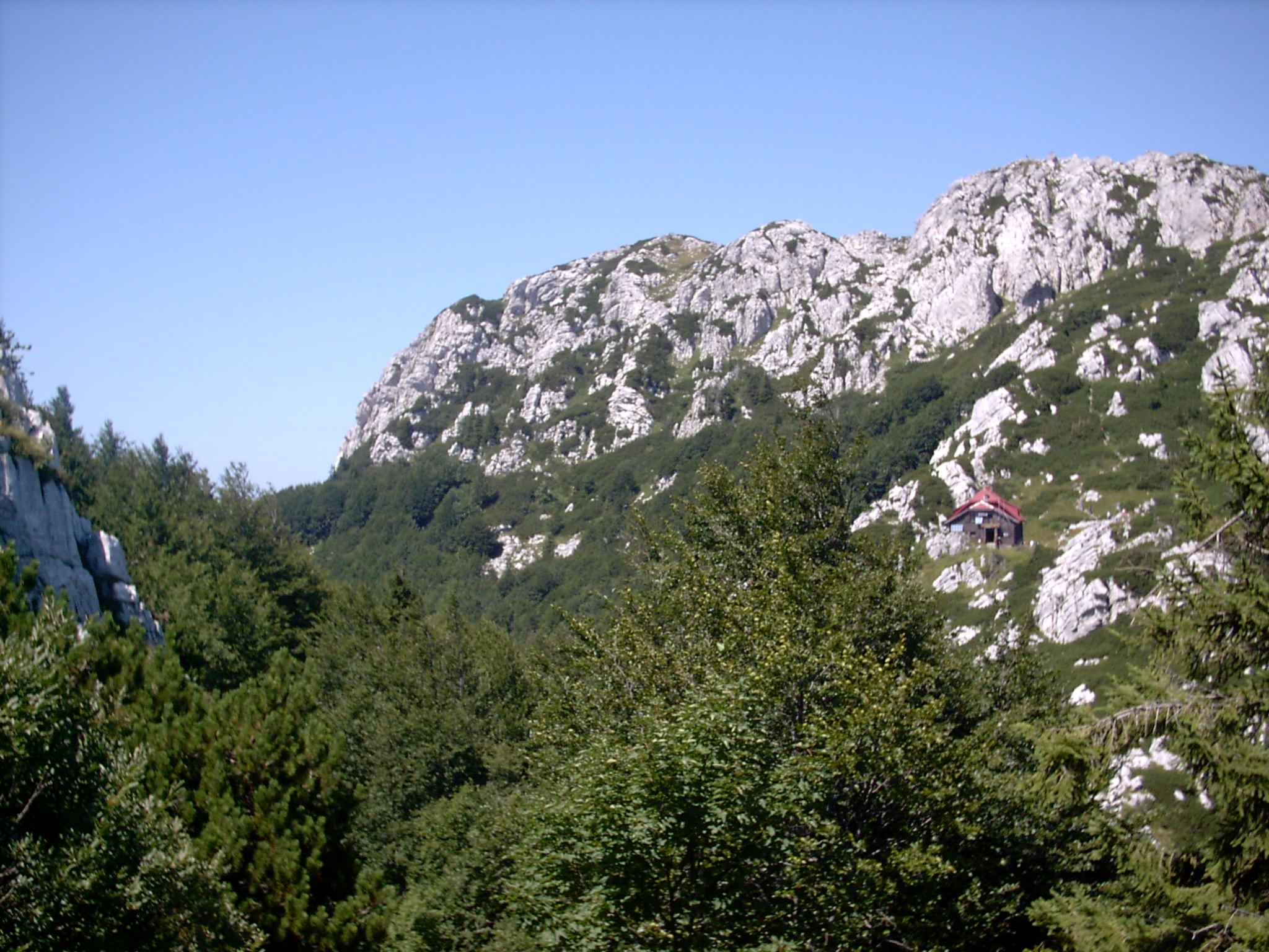 Nationalpark Risnjak – Berghütte unterhalb des Gipfels des Risnjak